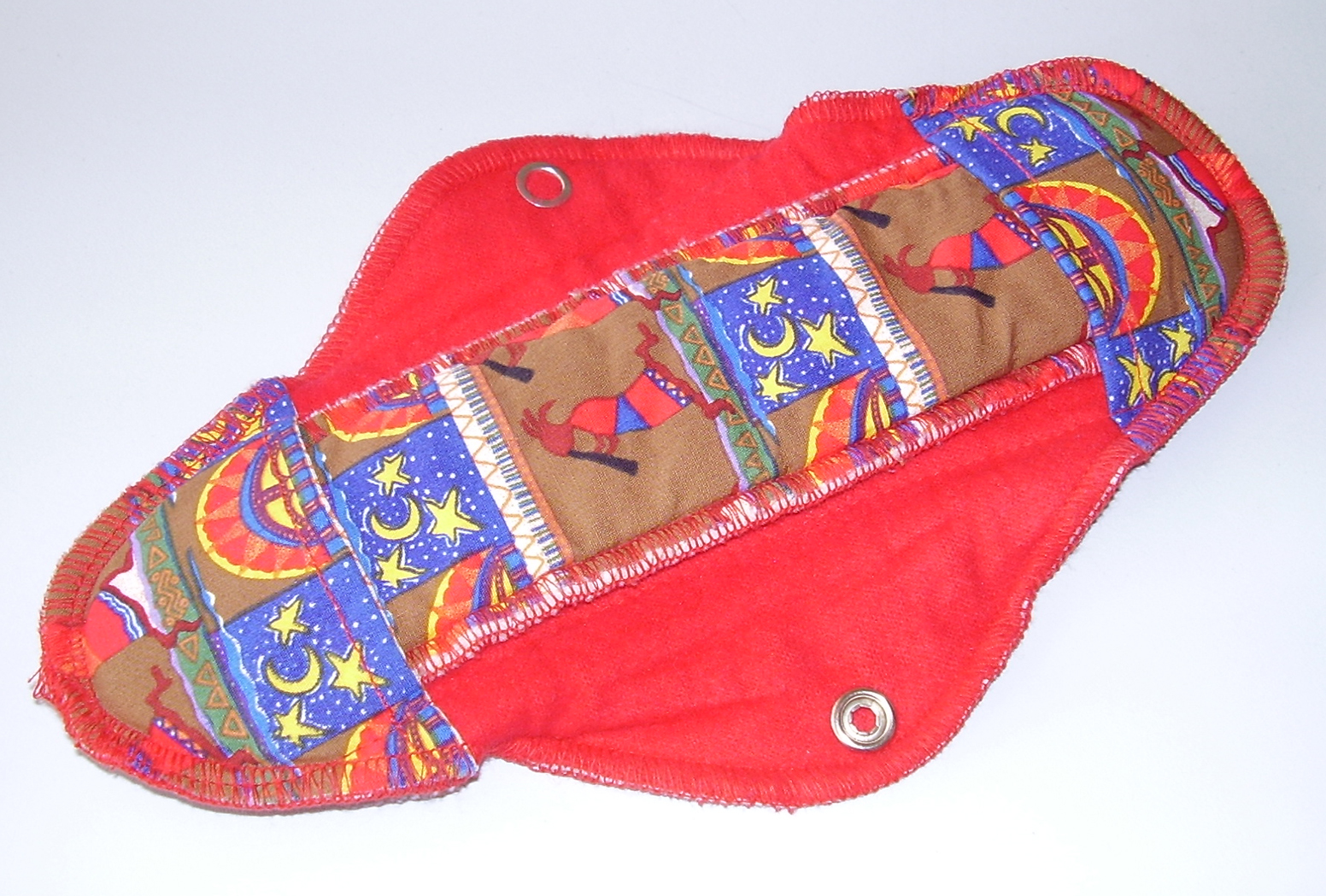 Sanitary napkin